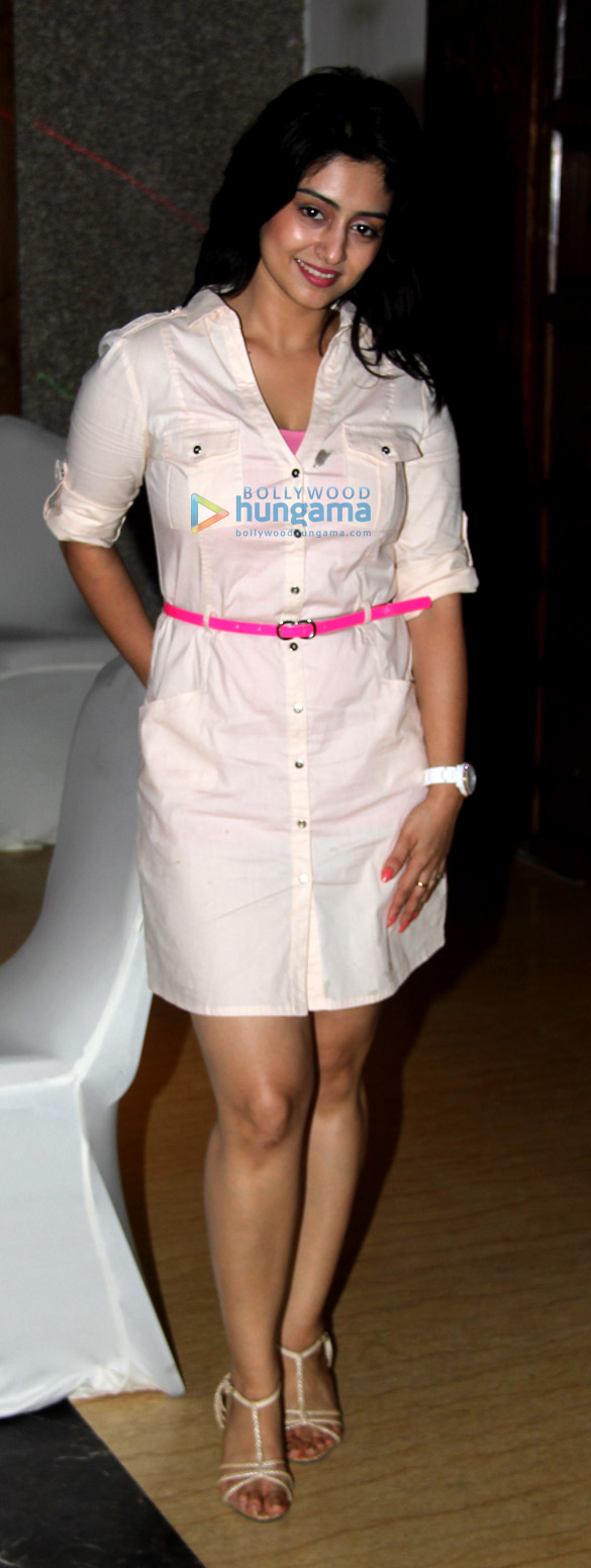 Tapasya Nayak Srivastava at Actress Melissa Pais' birthday bash